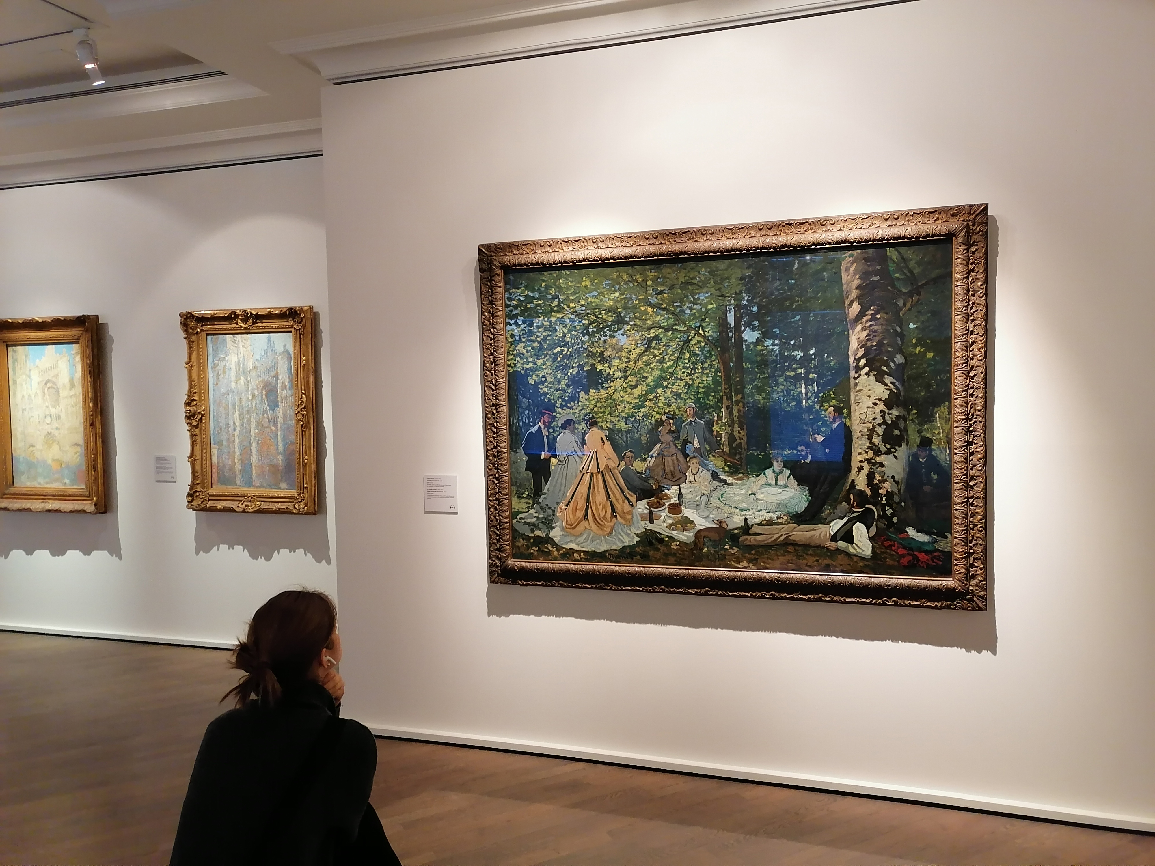 Пушкинский музей, галерея искусства 19-20 веков. Клод Моне (слева направо): «Руанский собор вечером», «Руанский собор в полдень», «Завтрак на траве»